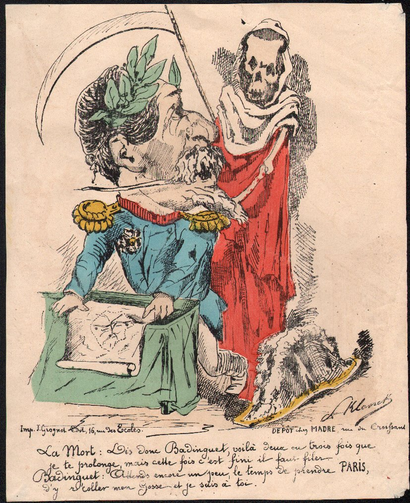 Badinguet et la mort, typogravure de Paul Klenck (1844-19...) caricaturant Napoléon III, Imprimé par Grognet, en dépot chez Madre, vers 1870. Format : 25 cm x 30,5 cm.